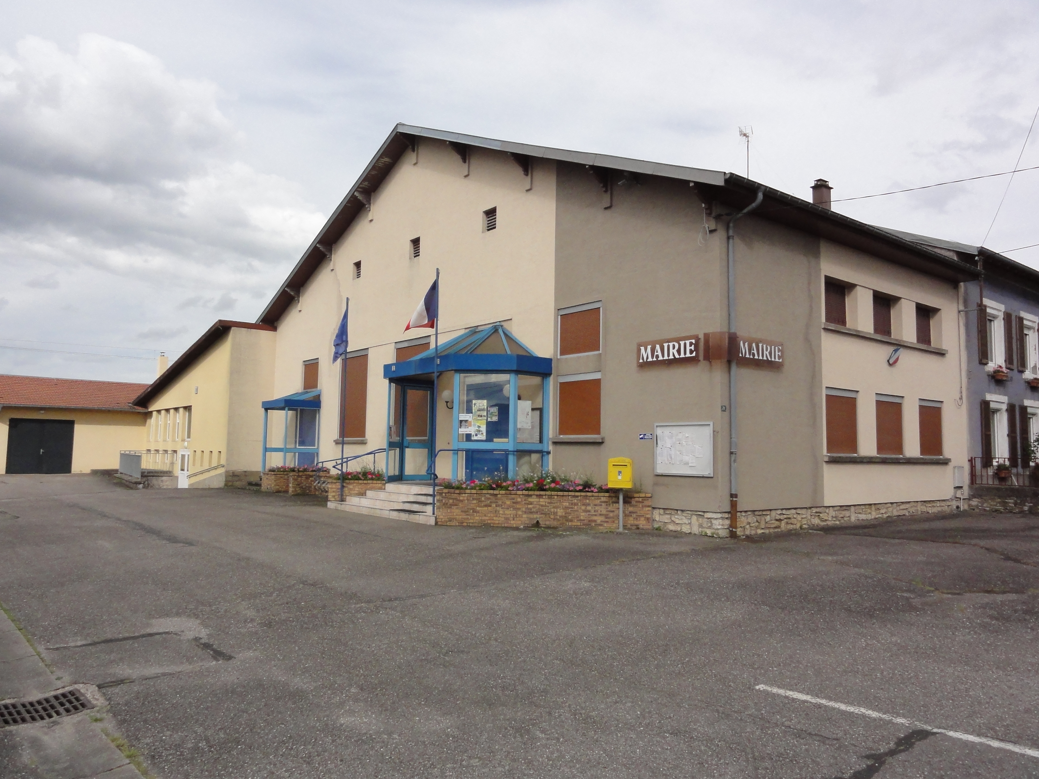 Chenevières (M-et-M) mairie